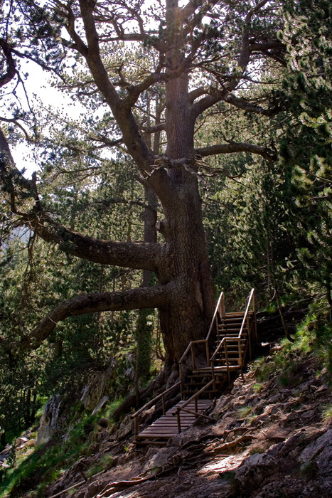 Байкушева мура-Пирин